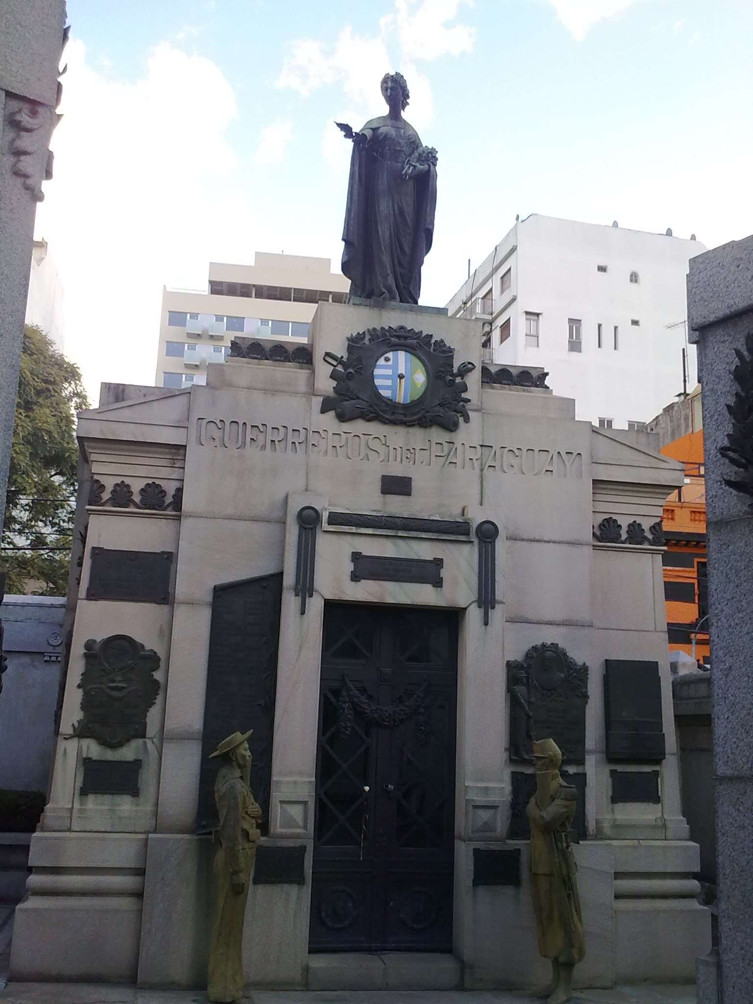 Panteón de los guerreros del Paraguay en el cementerio de la Recoleta, Buenos Aires. El coronel Manuel Díaz, el general Lino Oris de Roa, y el general Demetrio Mayorga , están enterrados aquí.